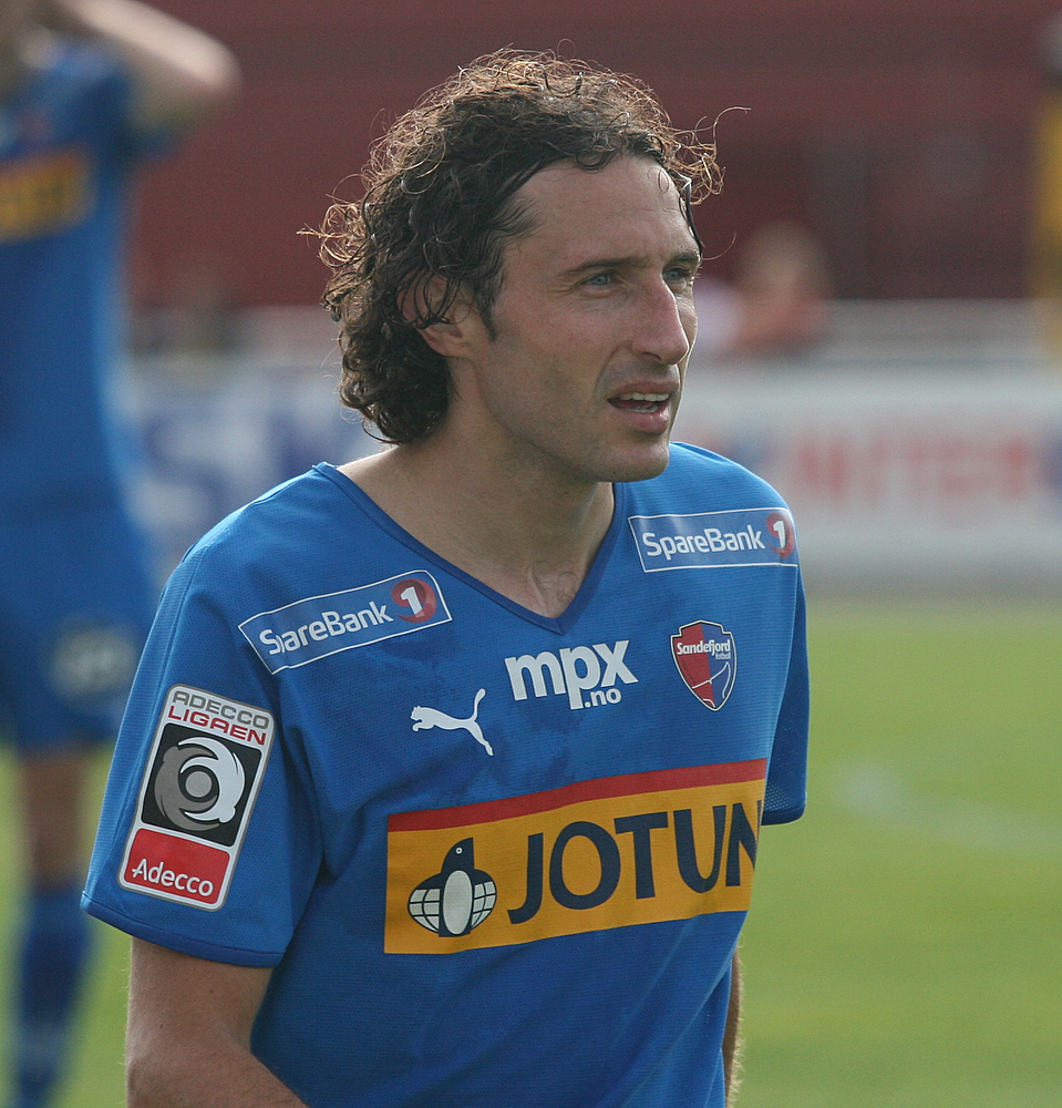 Olav Zanetti